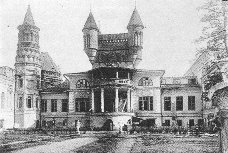 Покровское-Стрешнево. Господский дом. С открытки 1920-х гг. Pokrovskoye-Streshnevo, country estate. Postcvard, 1920s